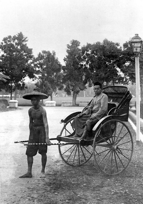 Repronegatief. Riksja, Medan